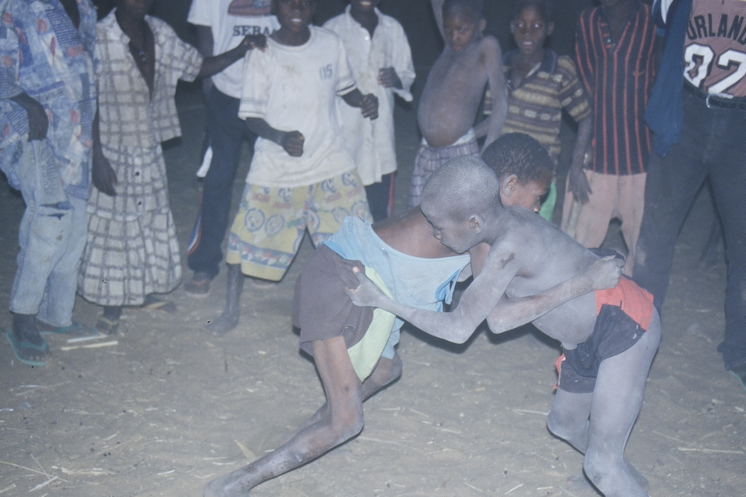 jeunes garçons s'adonnant à la lutte traditionnelle dans le village de Kani Kombolé au pays Dogon, région de Mopti, Mali